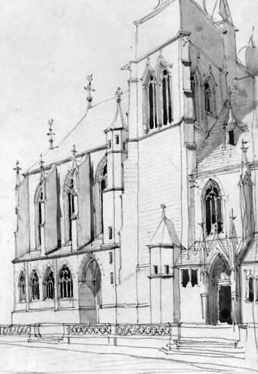 Heilbronn, Kilianskirche, Zeichnung von Conrad von Dollinger